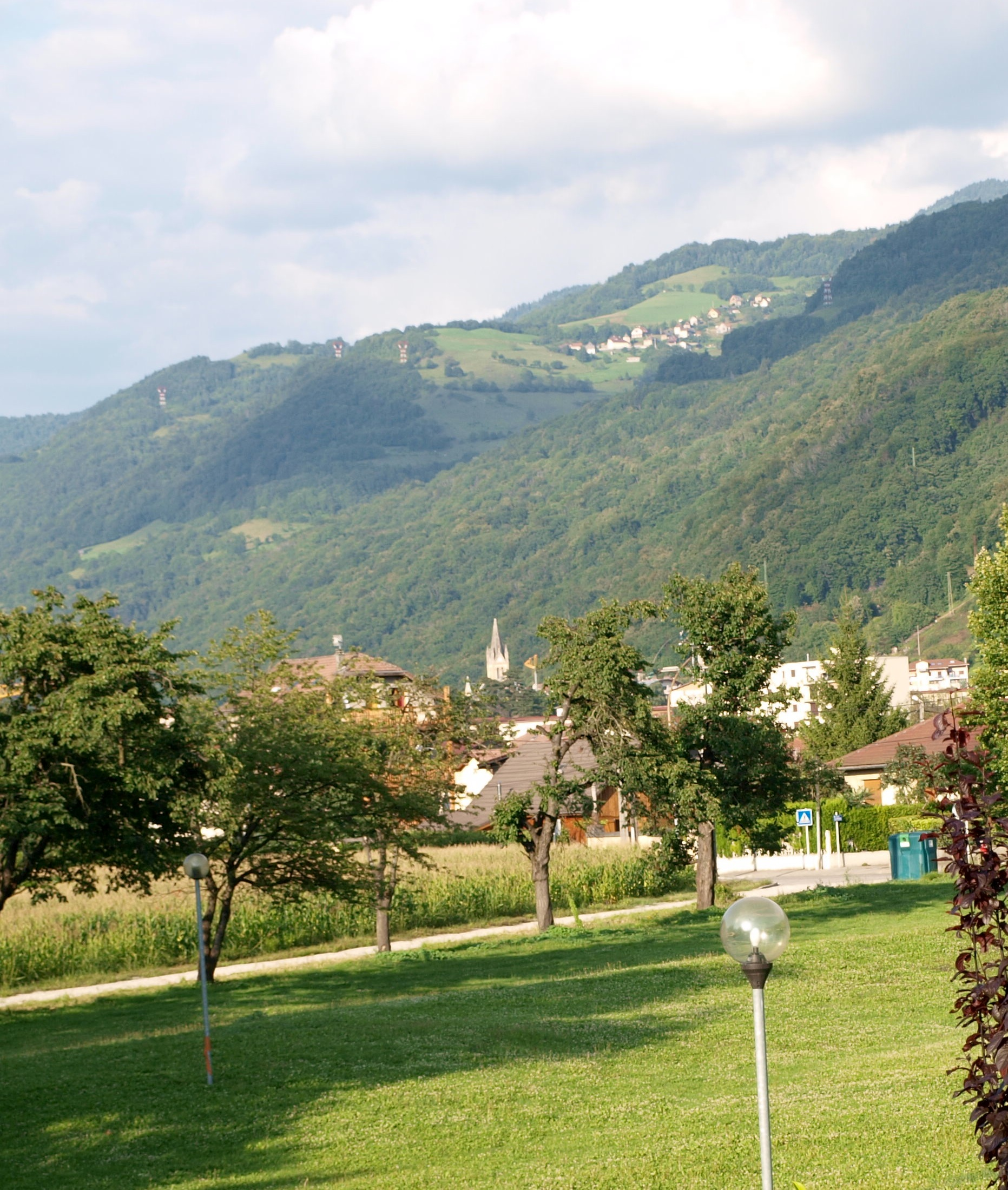 Quartier les Barrières, Murianette, Isère, France.